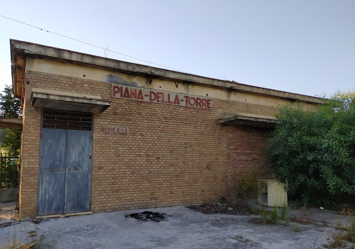 Stazione di Piana della Torre